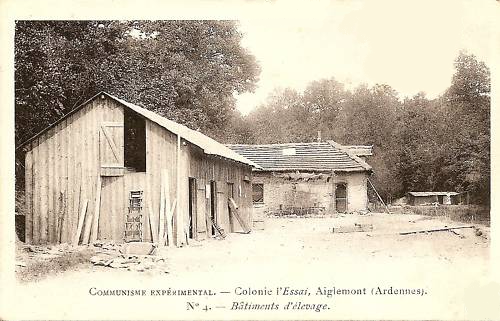 Postal da Colônia libertária L'Essai em Aiglemont, França em 1906.